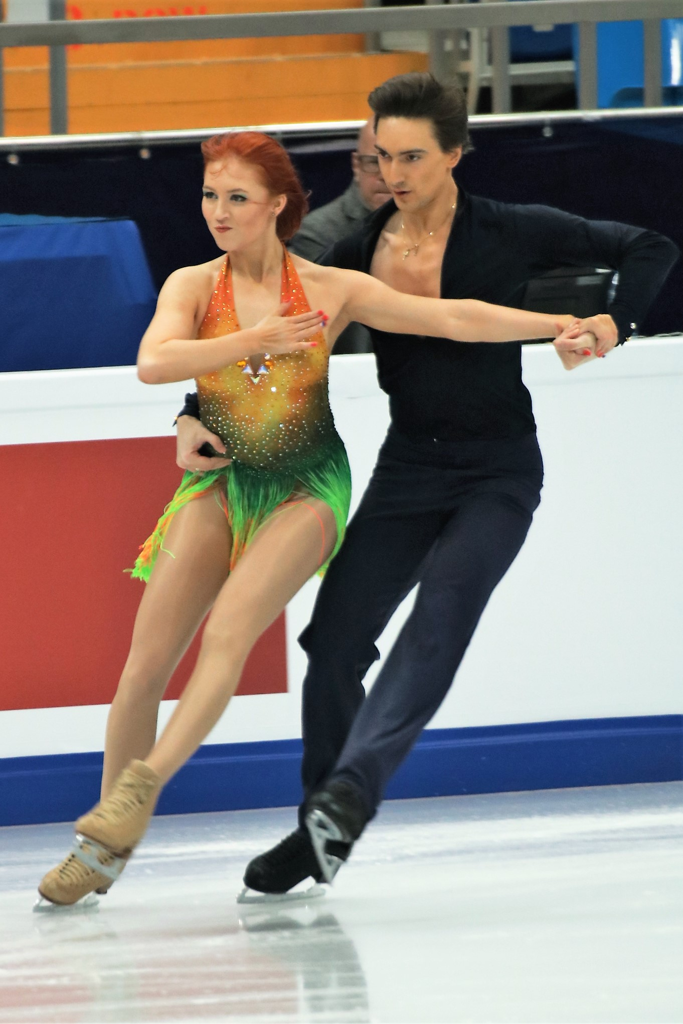 Тиффани Загорски / Джонатан Гурейро (Россия) на Чемпионате Европы по фигурному катанию 2018.